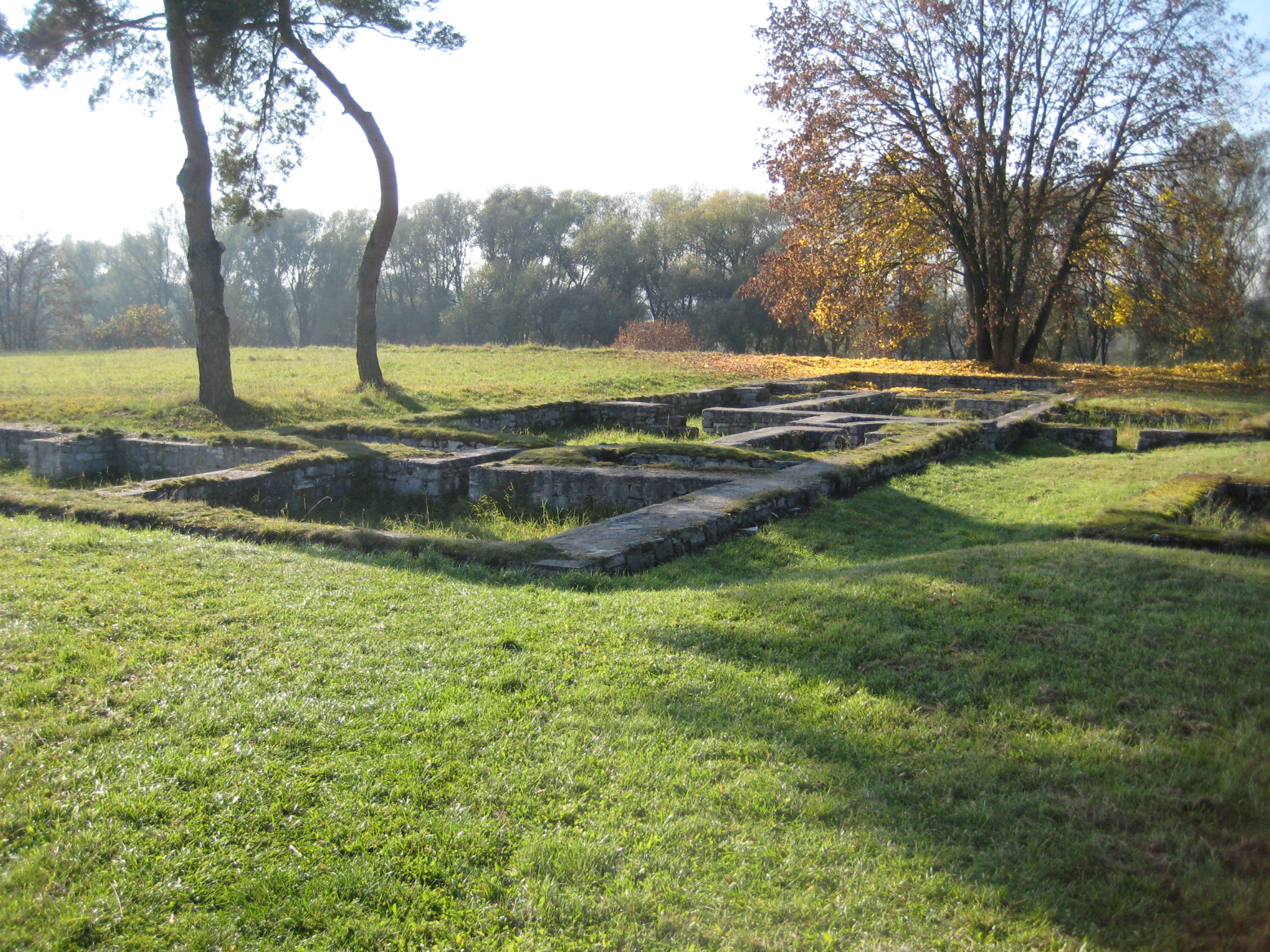 Kastell Eining: Mansio (Rasthaus) (Blick nach Westen zum Donausteilufer)